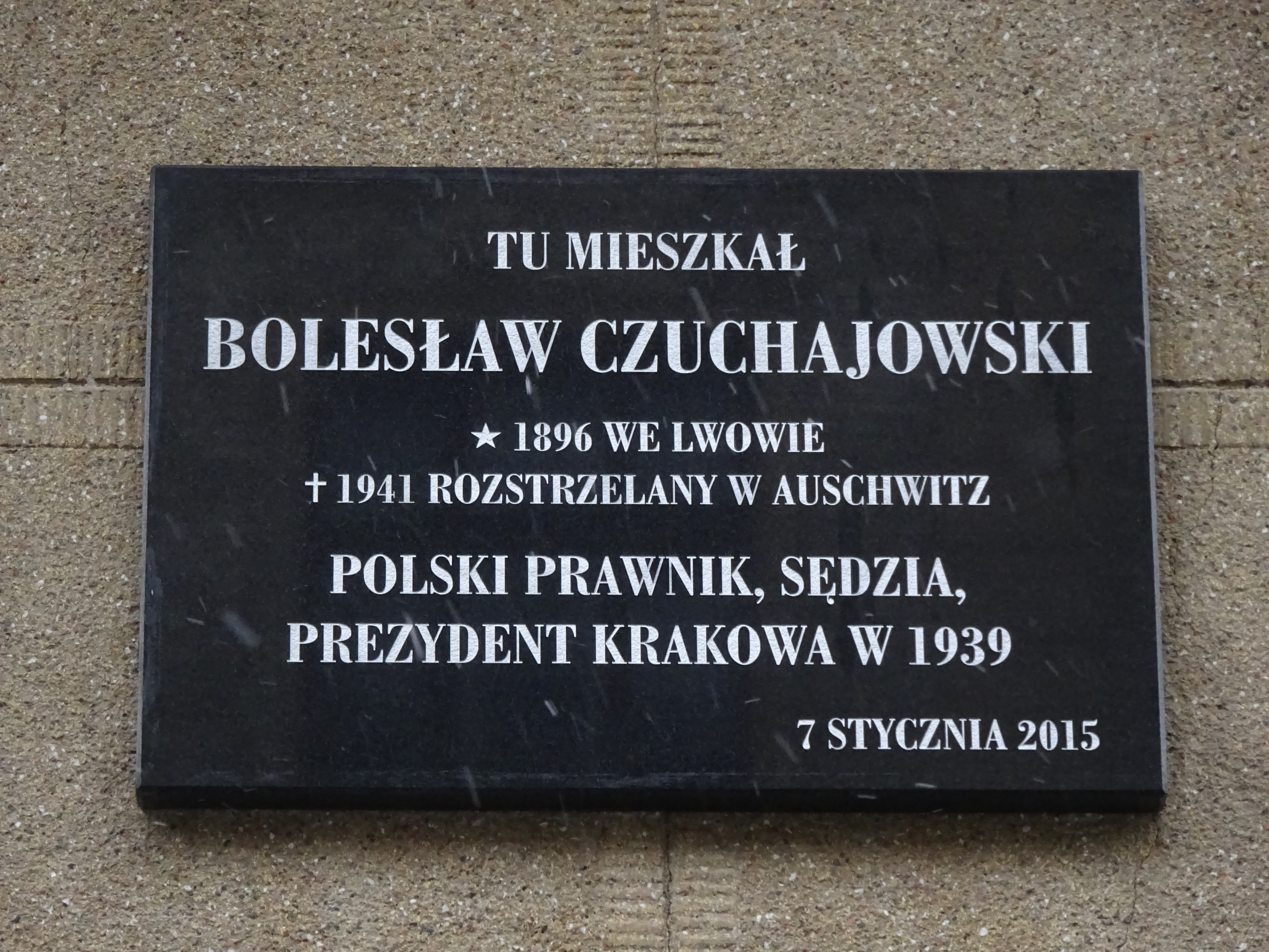 Ulica Krowoderska 63b - tablica upamiętniająca zamieszkiwanie owej kamienicy przez Bolesława Czuchajowskiego. Kraków, 2019.